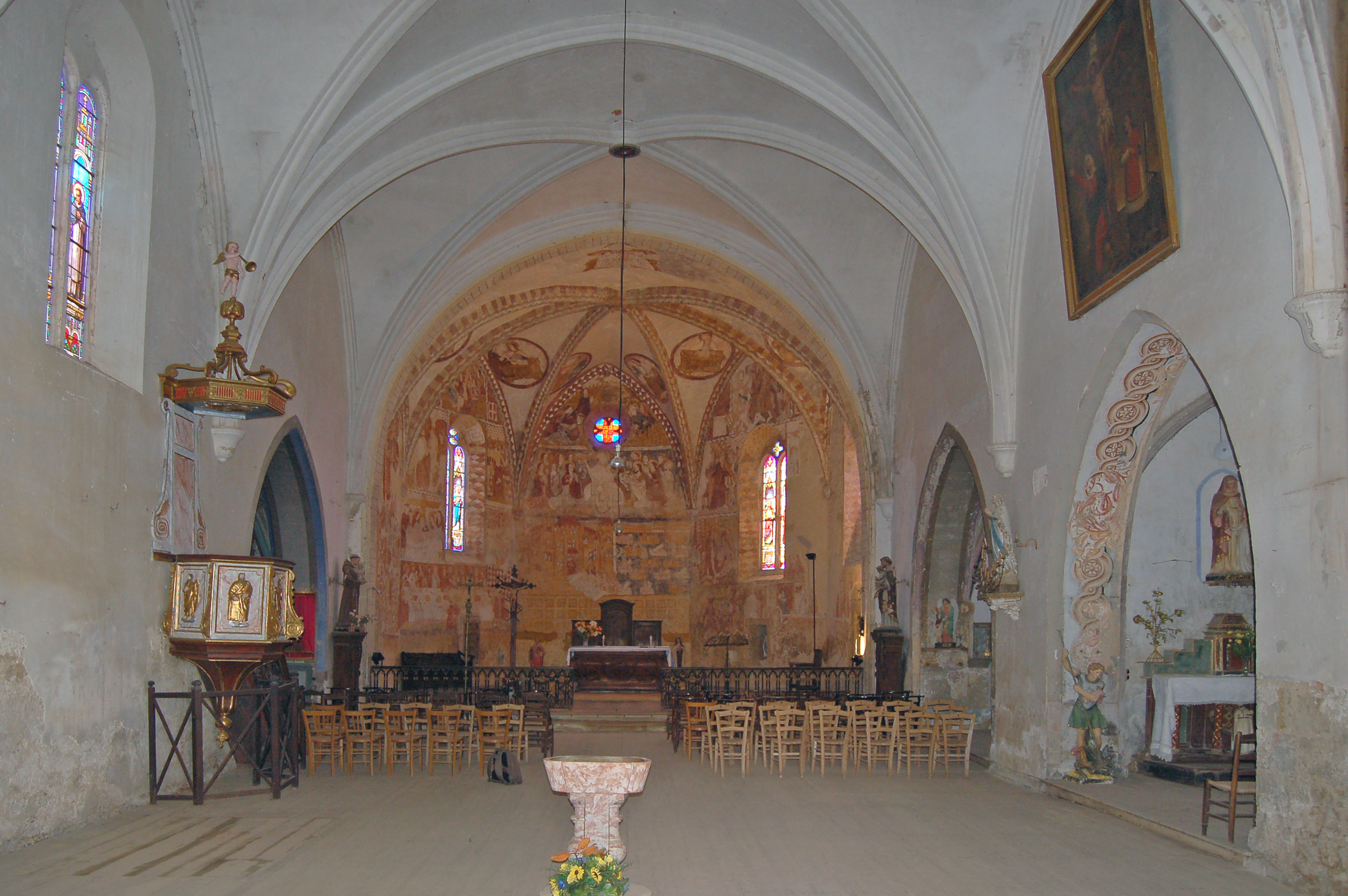 Le décor des murs accorde une large place aux épisodes de la Passion, de l' Entrée à Jérusalem à la Descente aux Limbes mais il doit surtout son intérêt à une représentation de l'Arbre de Jessé (*) arbre généalogique reliant Jessé, père de David à Jésus.